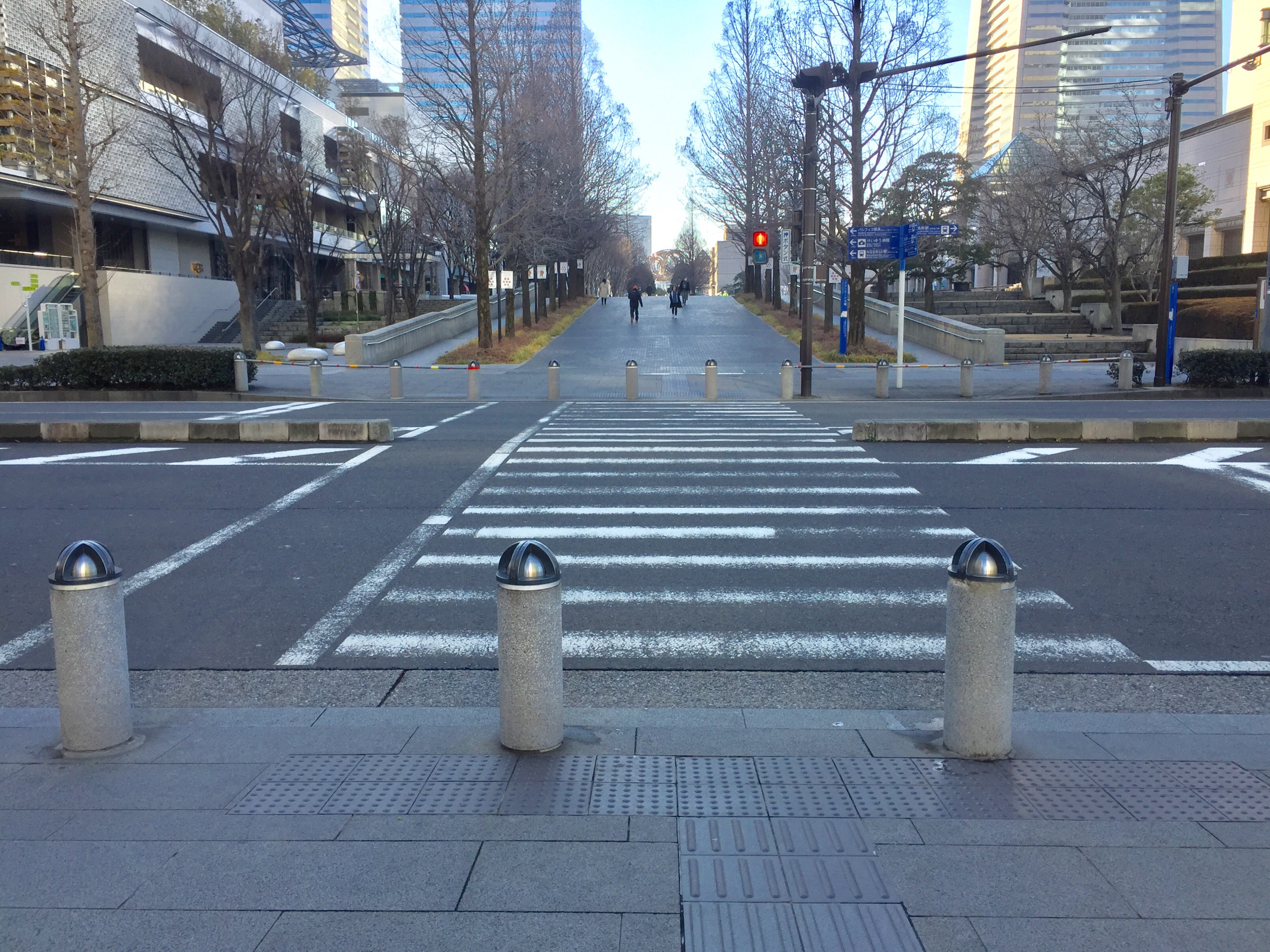 歩行者専用動線「グランモール軸」が横断歩道により一部途切れる。画像はグランドセントラルタワー前と横浜美術館前の間。